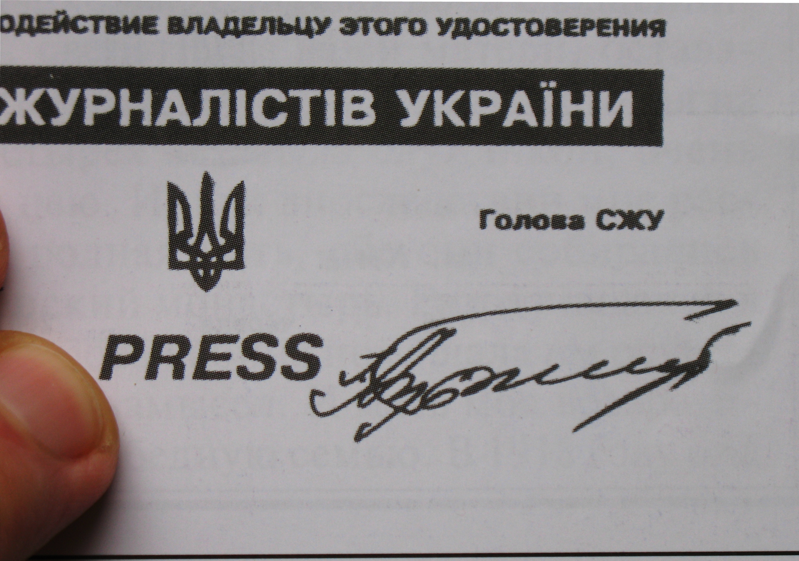 Карточка "ПРЕСС" СЖУ 2001. Подпись Лубченко. Надпись о содействии журналистам сделана по-русски.